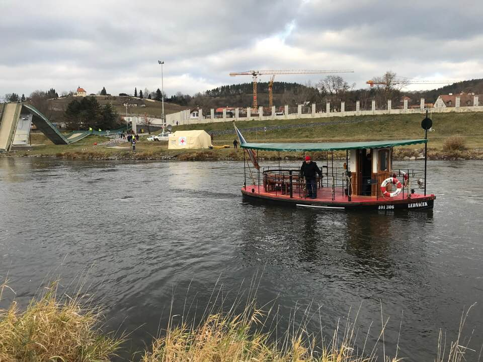 Zkušební plavba v Troji